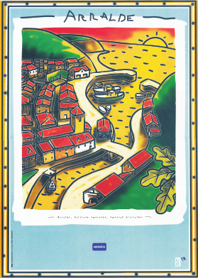 Goenkale